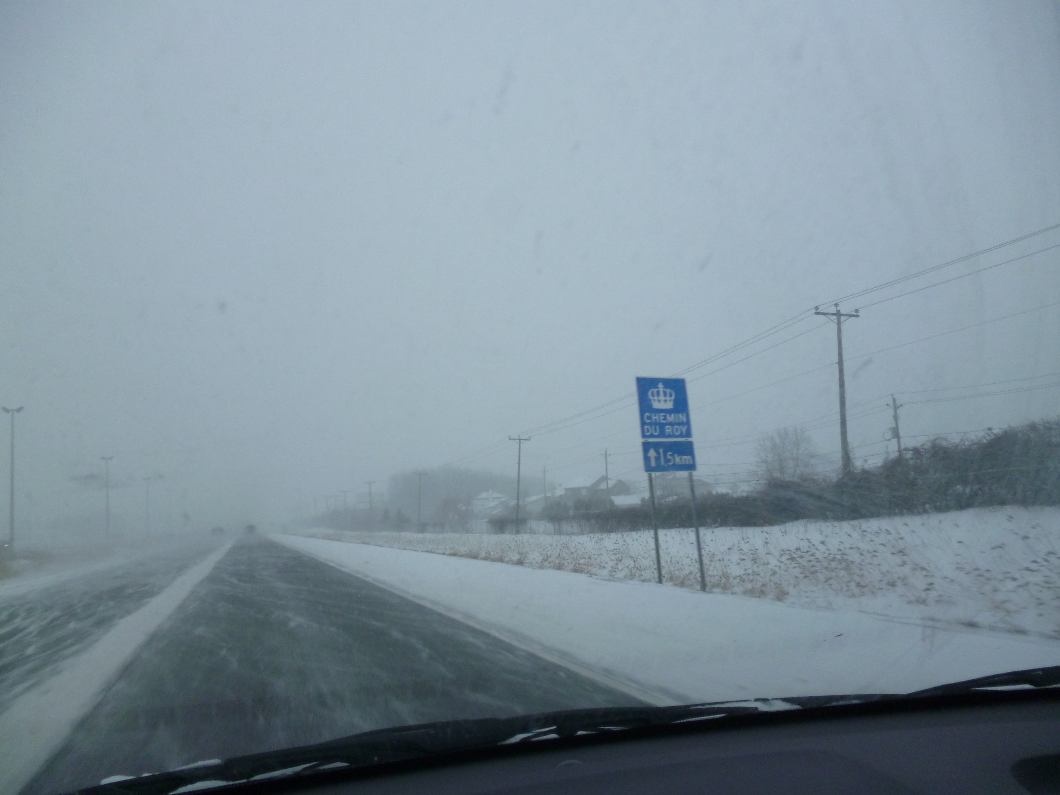 Le chemin du Roy au Québec.